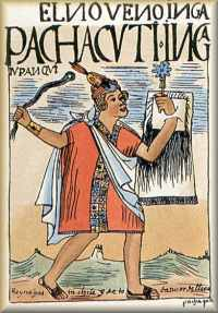 dibujo de Pachacútec (coloreado) por Guaman Poma de Ayala, siglo XVII